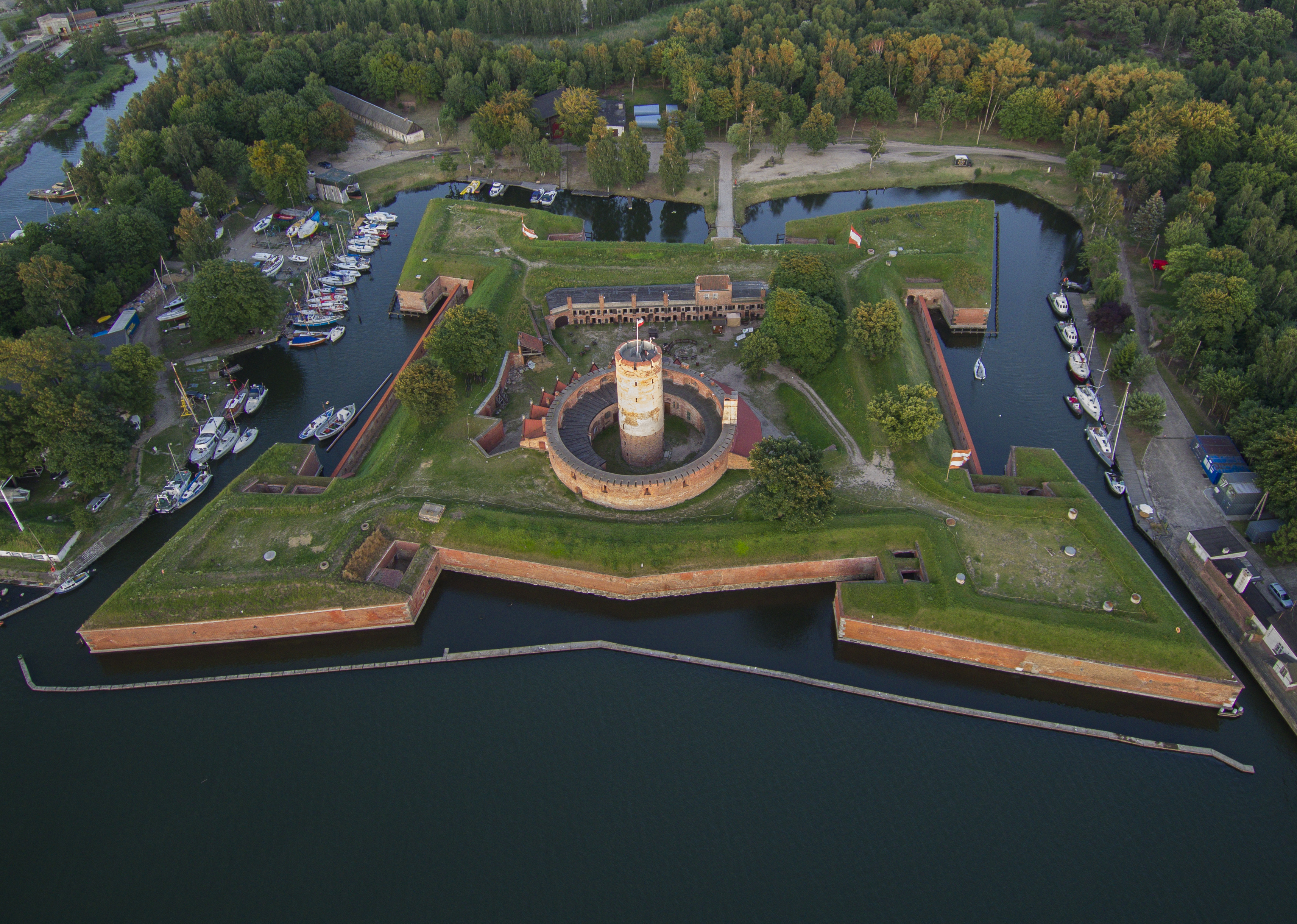 Gdańsk, Twierdza Wisłoujście